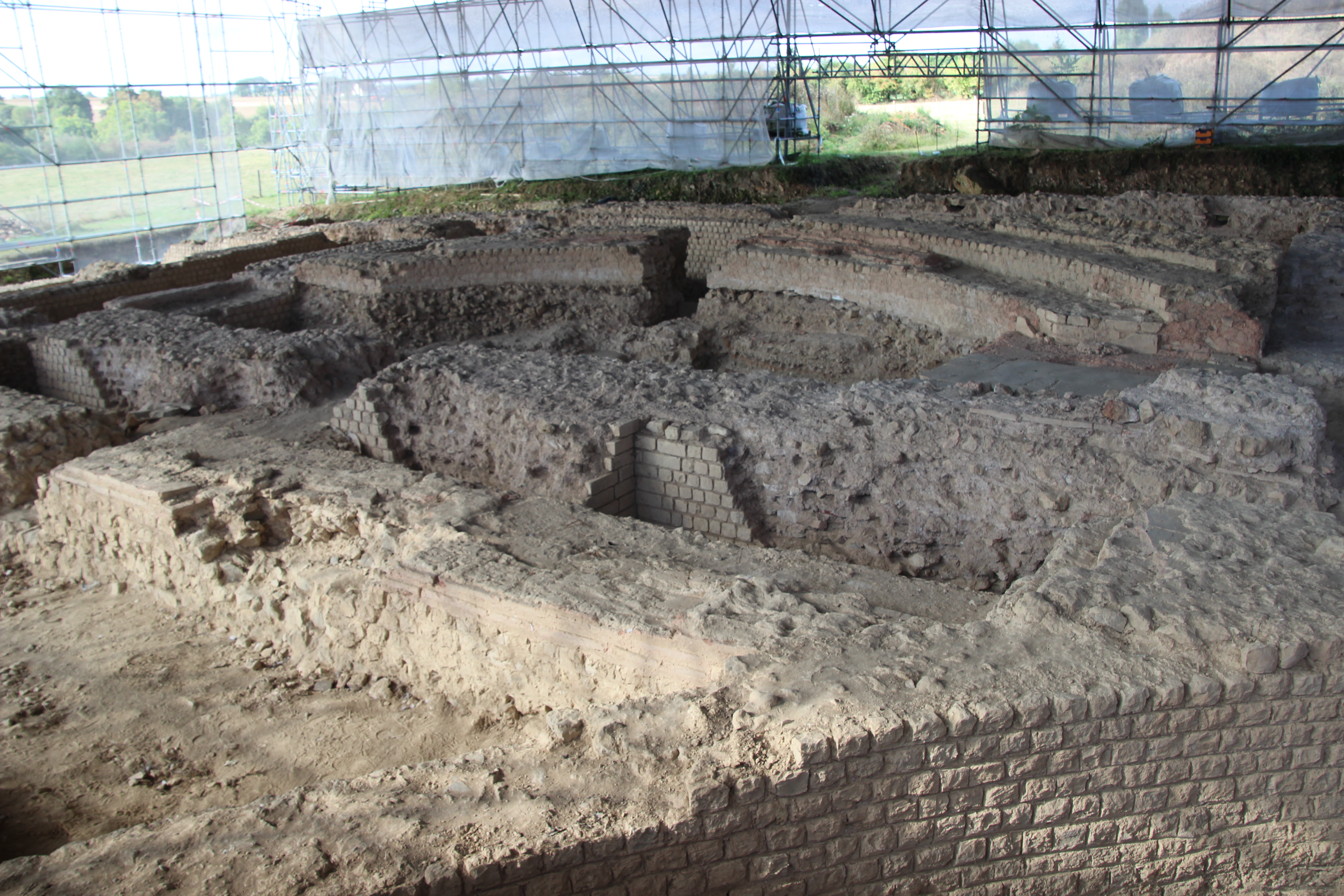 Vestiges de la Curie dans la partie orientale du forum de Vieux-la-Romaine (Calvados, Normandie, France). Dernière saison de fouilles 2016.